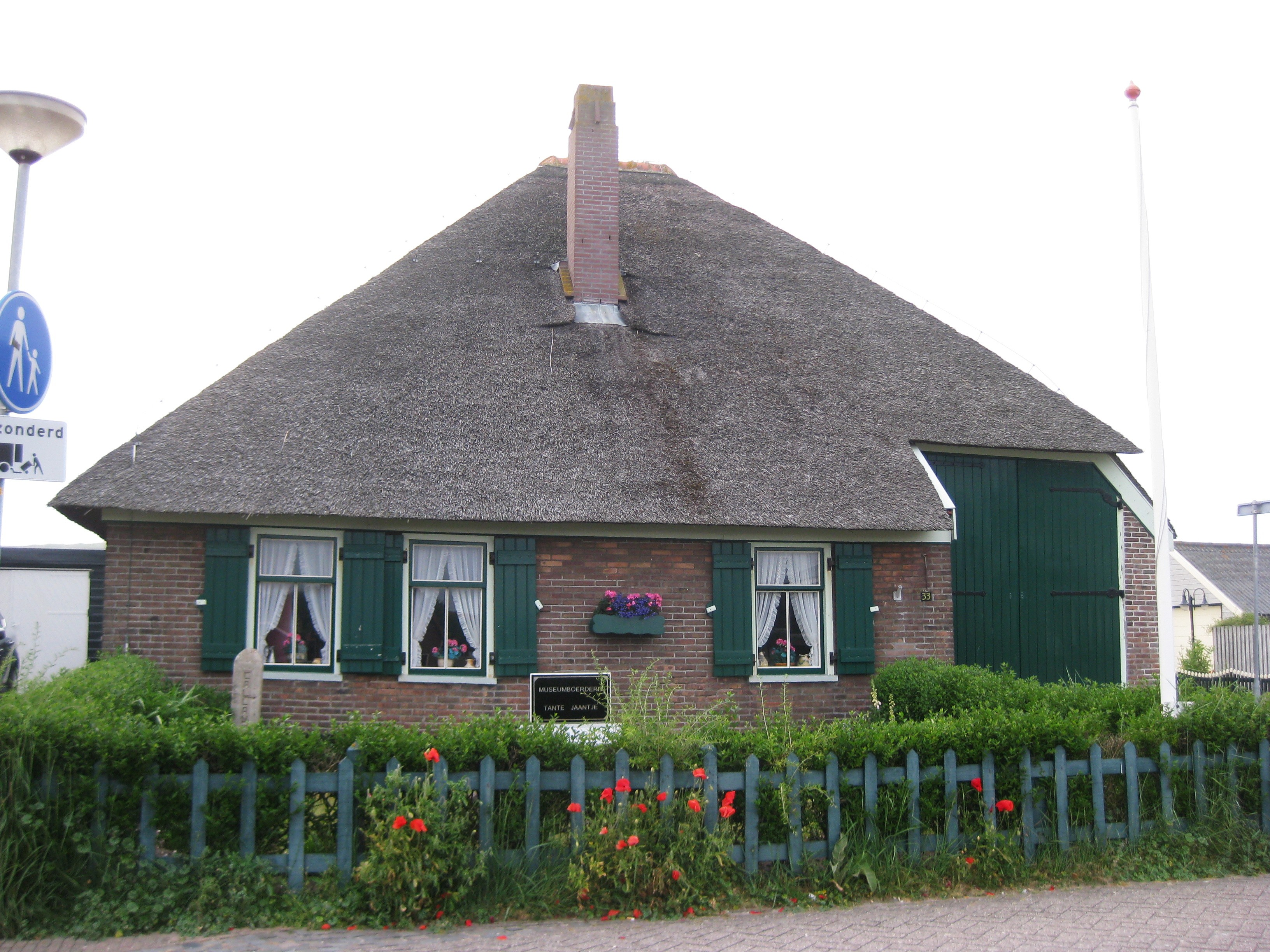 Museumboerderij Tante Jaantje; Dorpsplein 33, Callantsoog, Noord-Holland